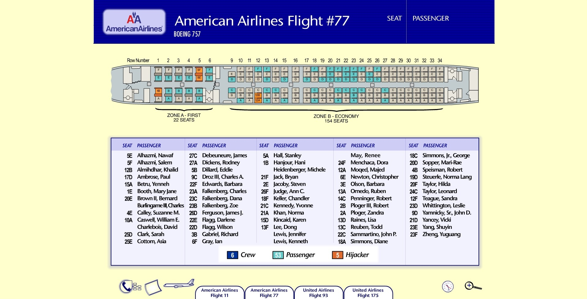 Auszug aus einer Flash-Präsentation, welche im Gerichtsverfahren United States vs. Zacarias Moussaoui (Nr. 01-455-A) verwendet wurde (